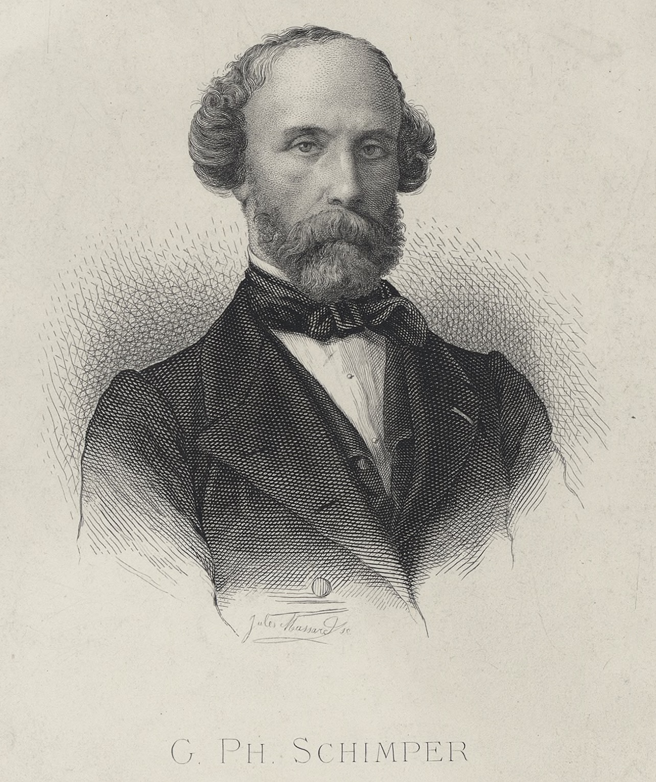 Le professeur Schimper (Charles Grad, L'Alsace, le pays et ses habitants, Hachette, 1906 (rééd.), p. 505)